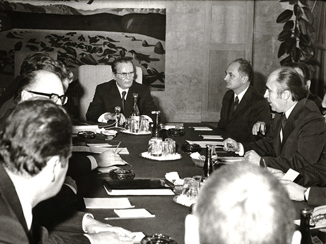 Српски (ћирилица): Седница Извршног комитета Председништва ЦК СКЈ, Брдо код Крања Инвентарски број: 1974_568_154